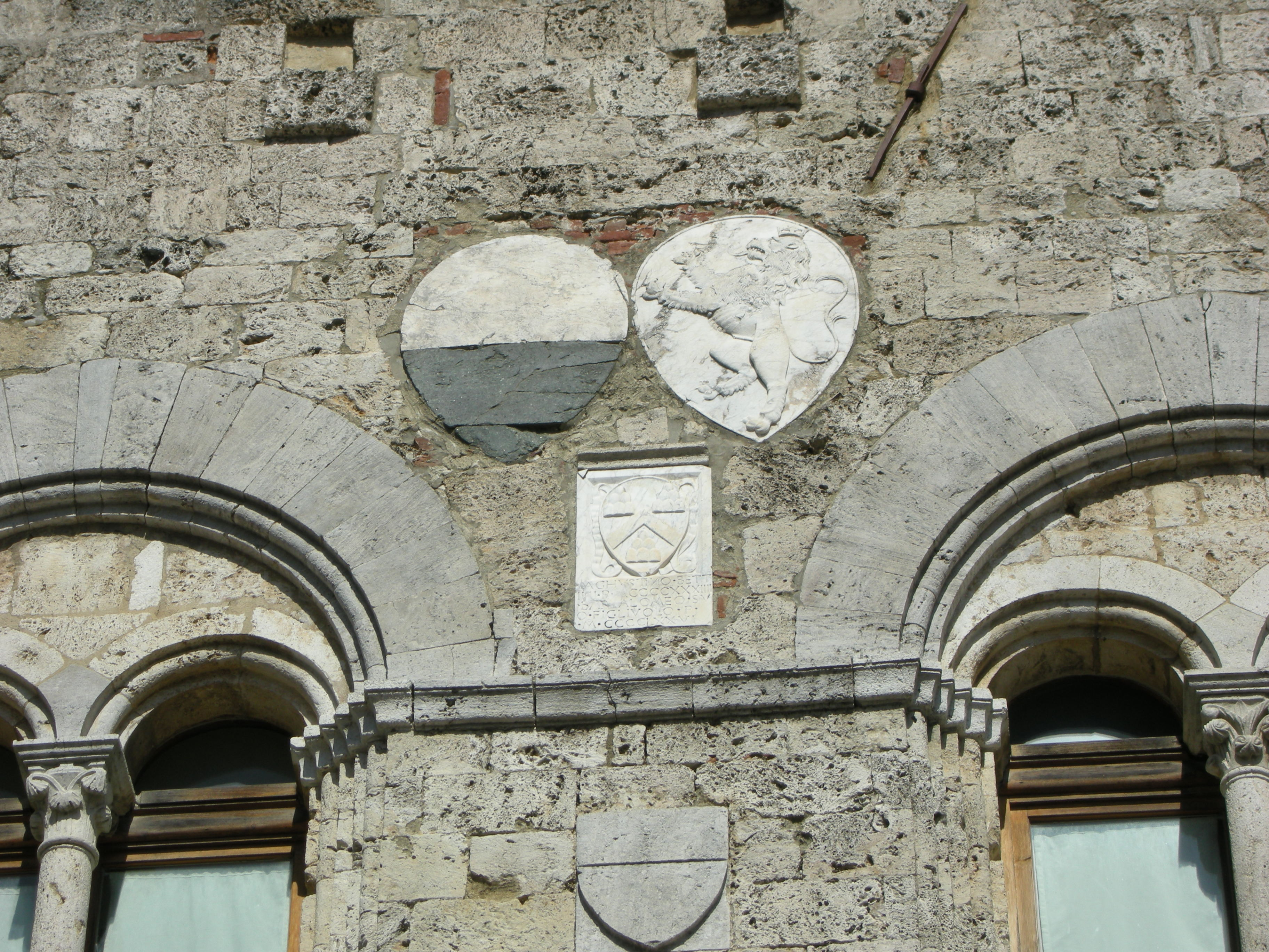 Palazzo pretorio di massa marittima, stemmi